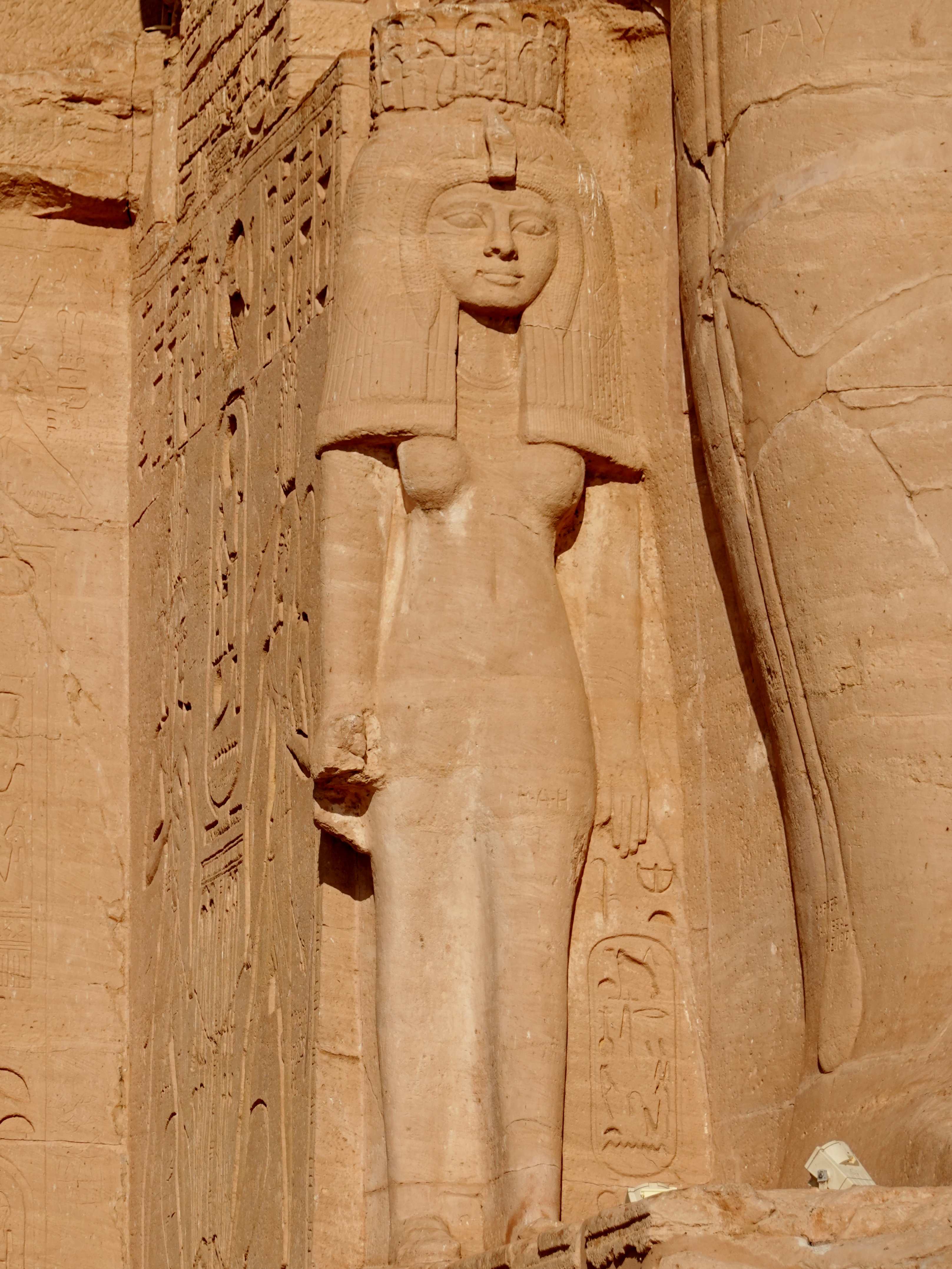 Darstellung der Nefertari am Großen Tempel von Abu Simbel, Ägypten